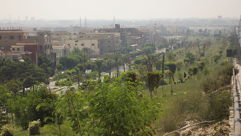 لقطات داخل مدينة العبور.